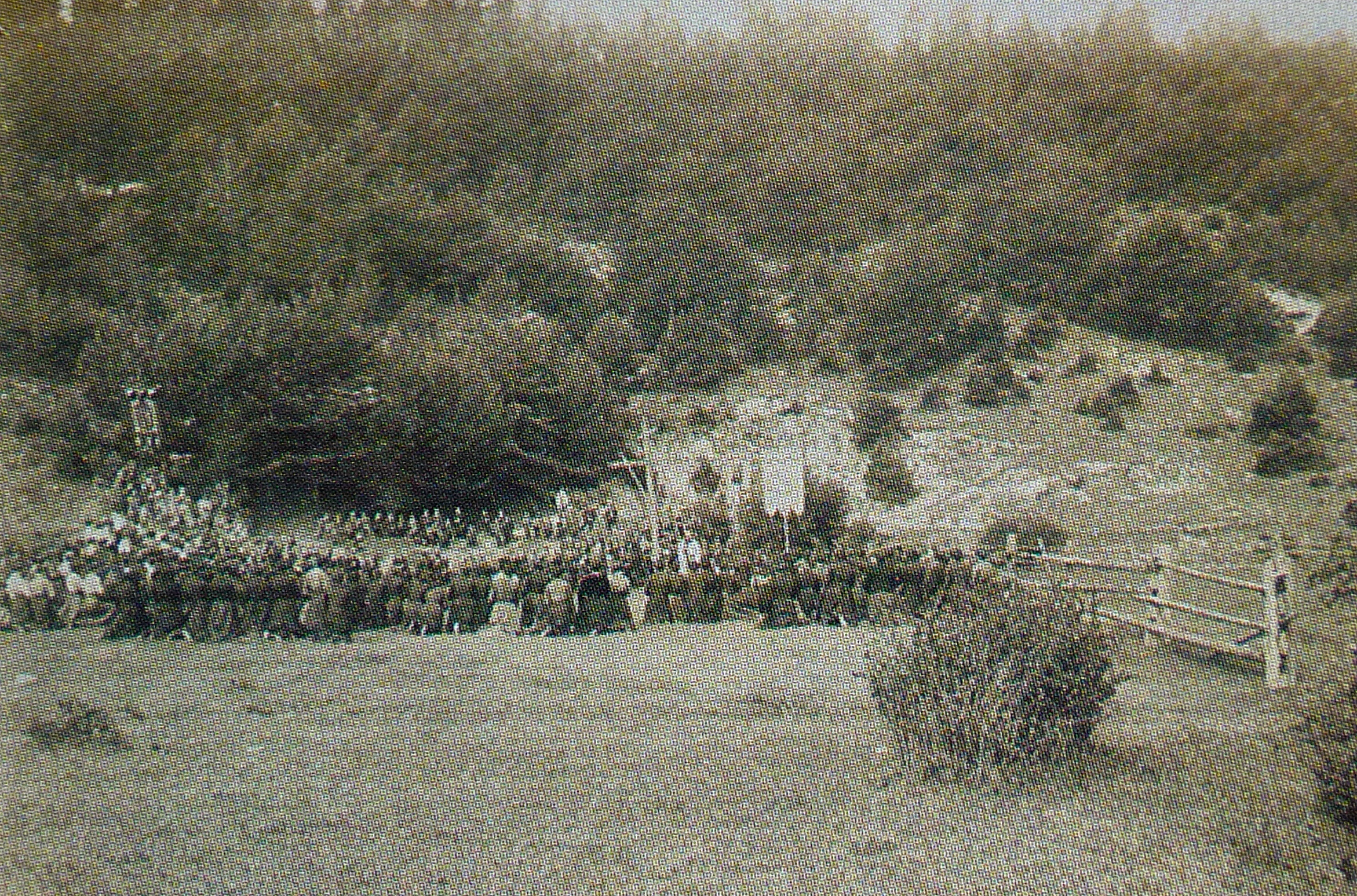 Massengrab von Domat/Ems Gedenkfeier